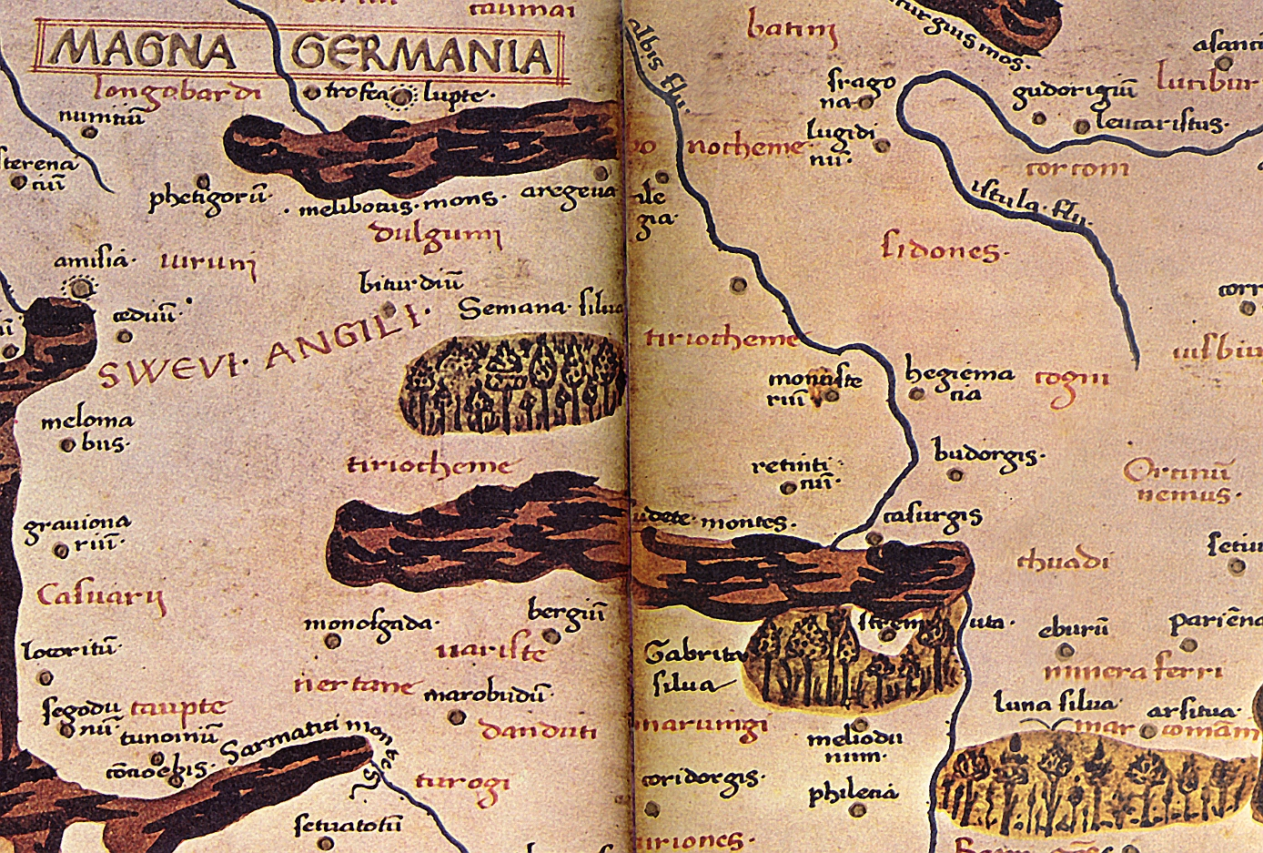 "TEURIOCHAIMAI" - Bezeichnung der Bewohner in einem der Siedlungsgebiete der Germania magna, Detailbild von der Karte zur Germania magna.